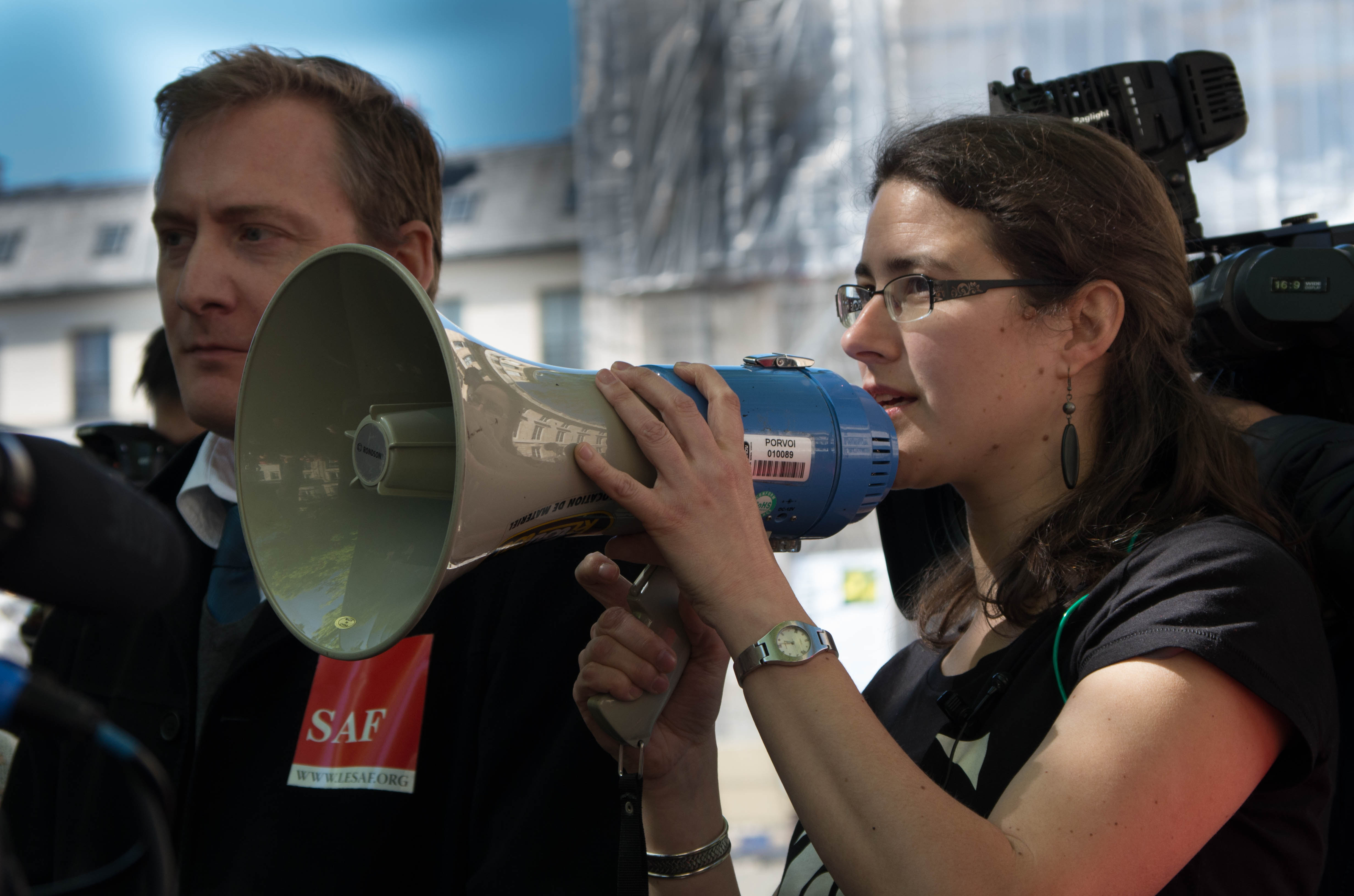 Adrienne Charmet-Alix au mégaphone